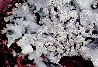 Punctelia subrudecta